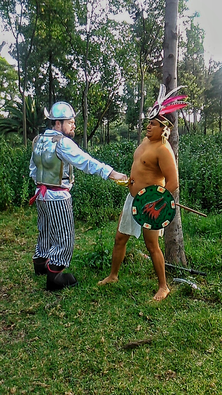 Batalla de conquista